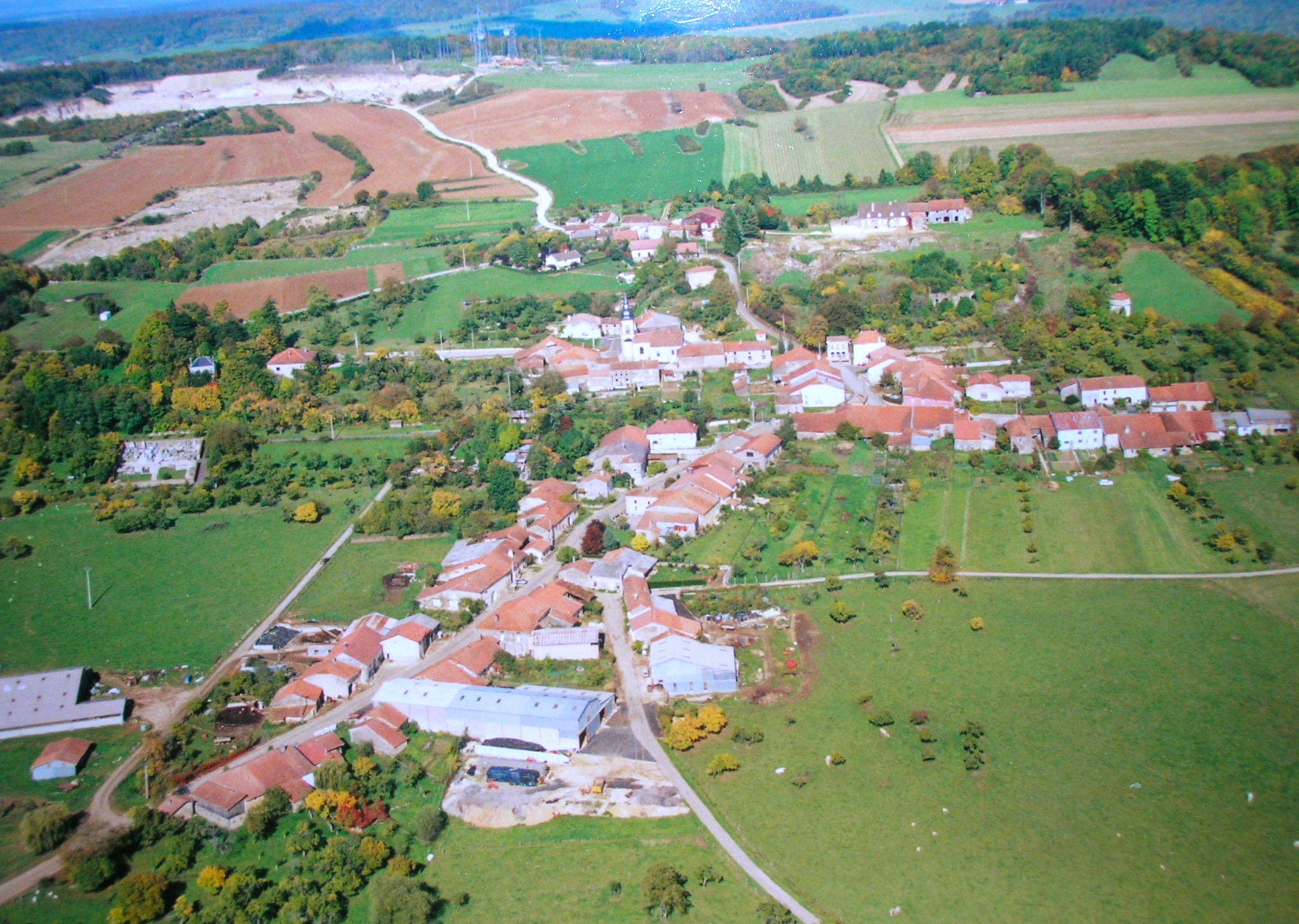 Photo aérienne de Beaufremont (fin des années 1990)